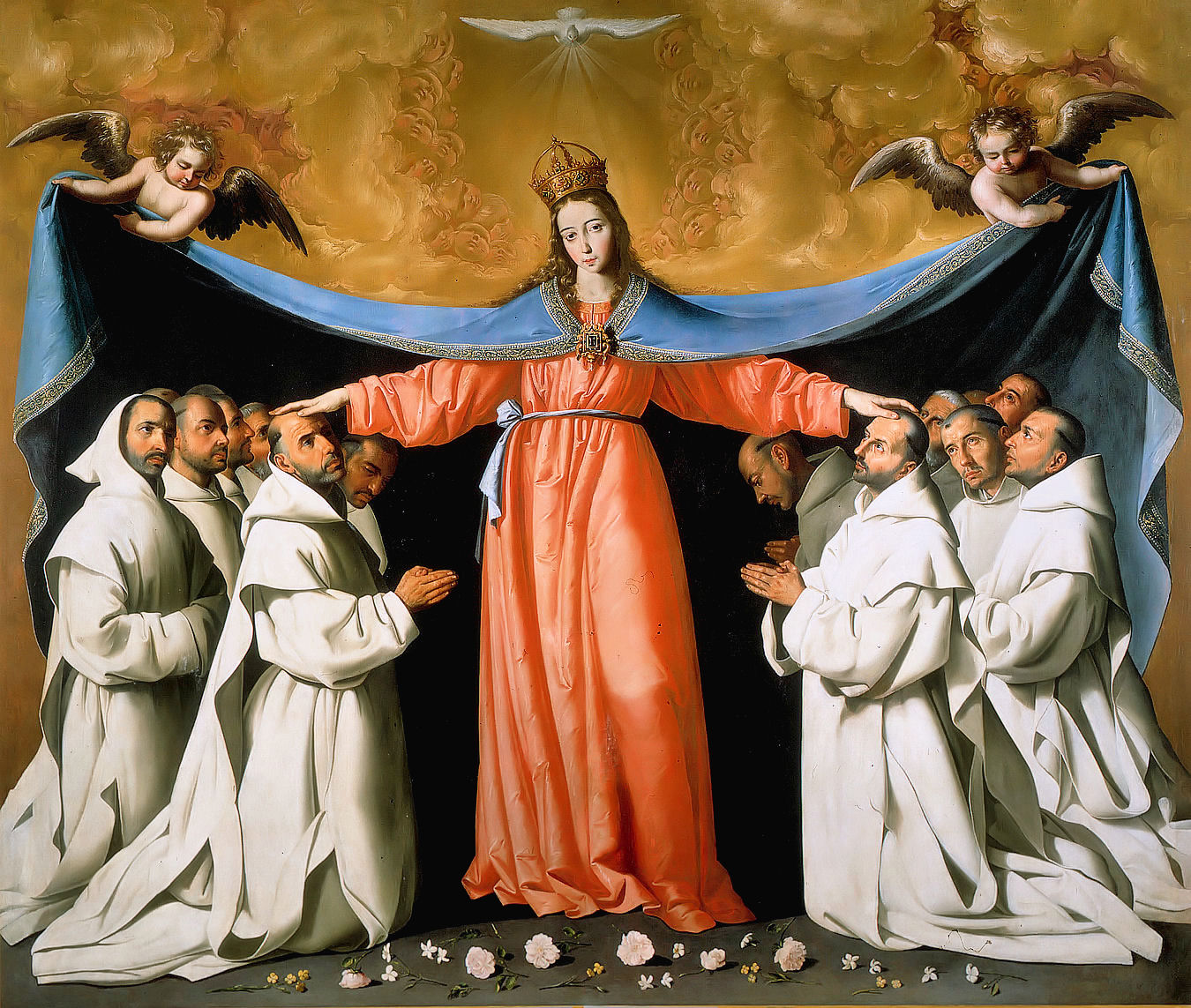 old painting Zurbaran; La Virgen de las Cuevas.